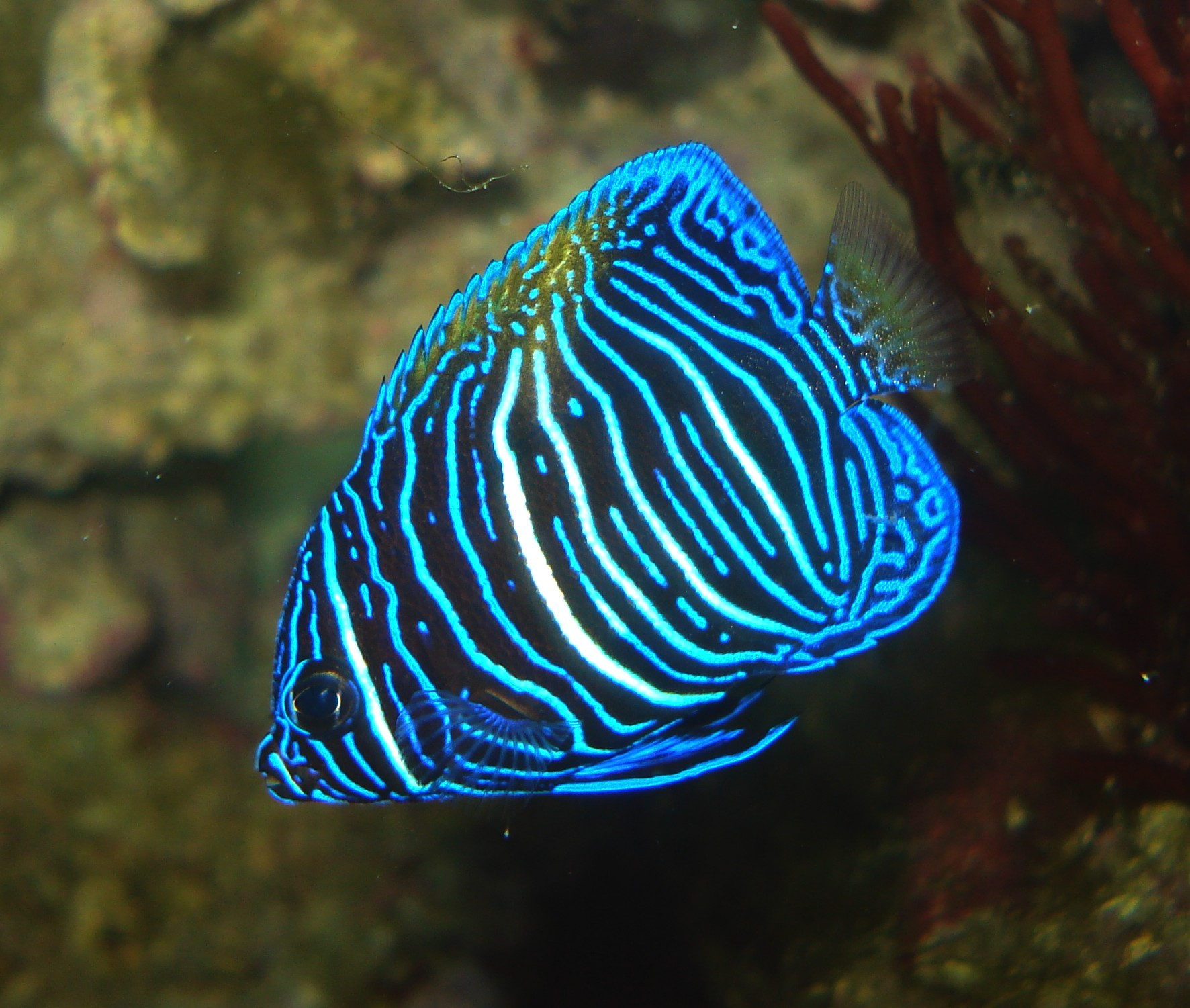 Blue juvenile marine Pomacanthus maculosus Angelfish fish